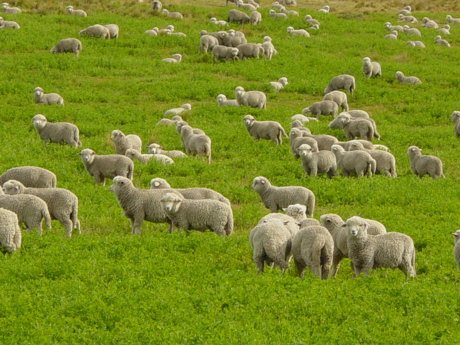 Author Jaime Vásquez Sapunar